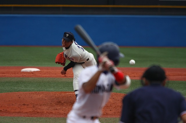 東都リーグ 東洋大学 藤岡貴裕投手 神宮球場 2011年